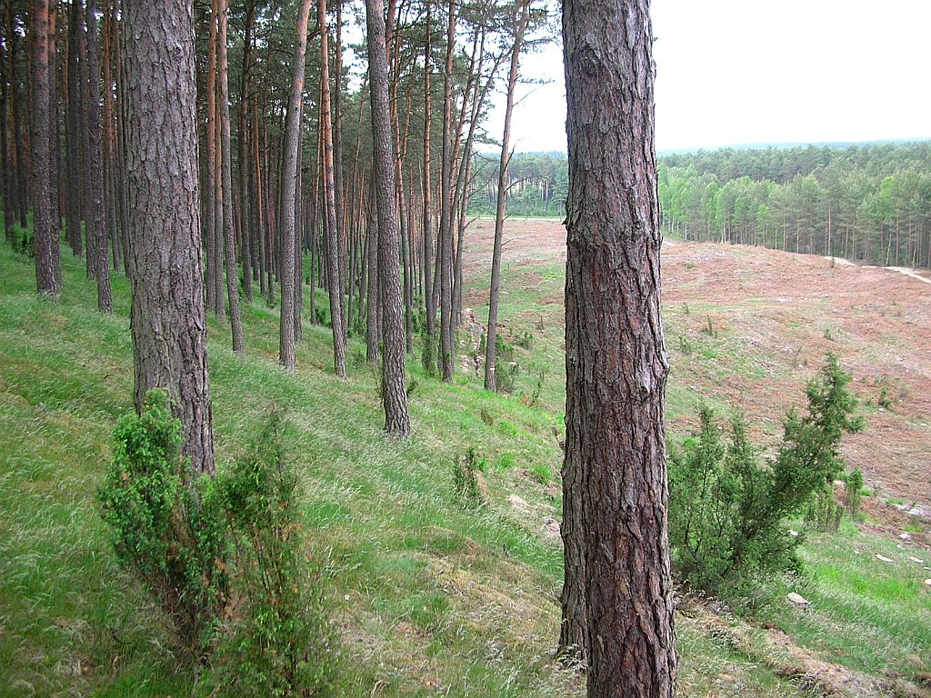 Puszcza Bydgoska